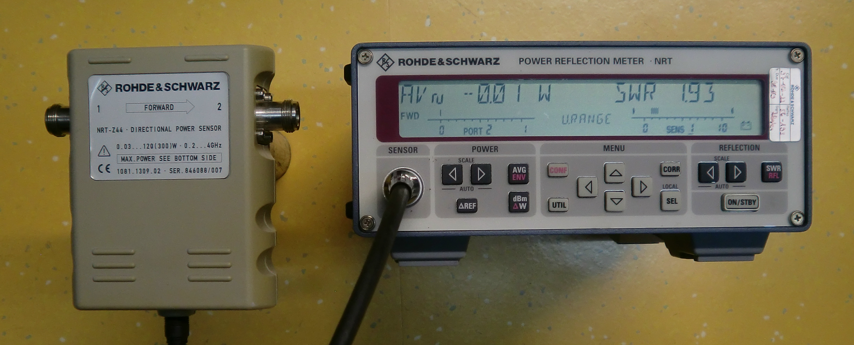 Professionelles Stehwellenmessgerät mit abgesetztem Richtkoppler Rohde & Schwarz Typ NRT 0,2 - 4 GHz bis 120 W